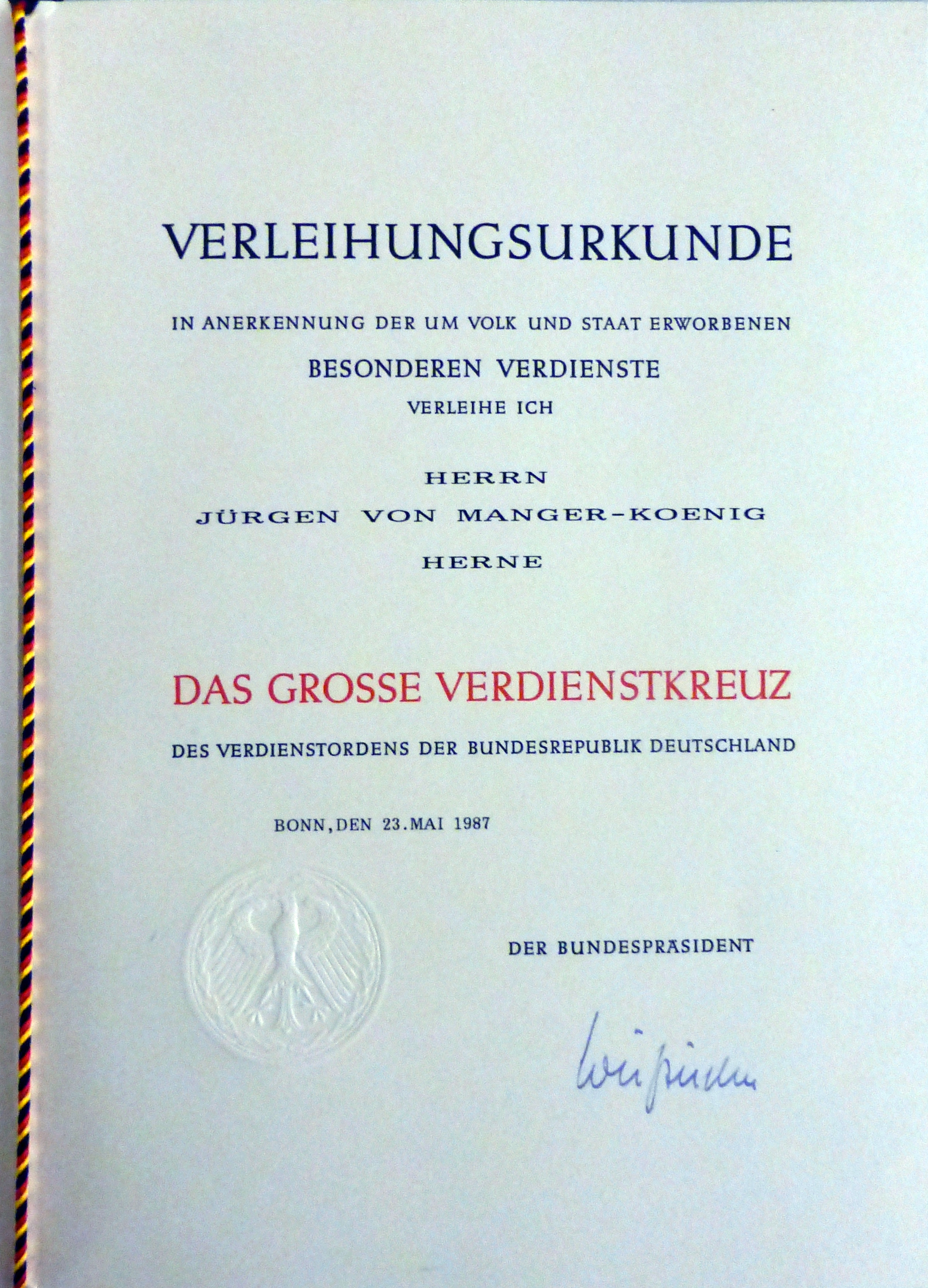 Verleihungsurkunde des Bundesverdienstkreuzes an Jürgen von Manger.